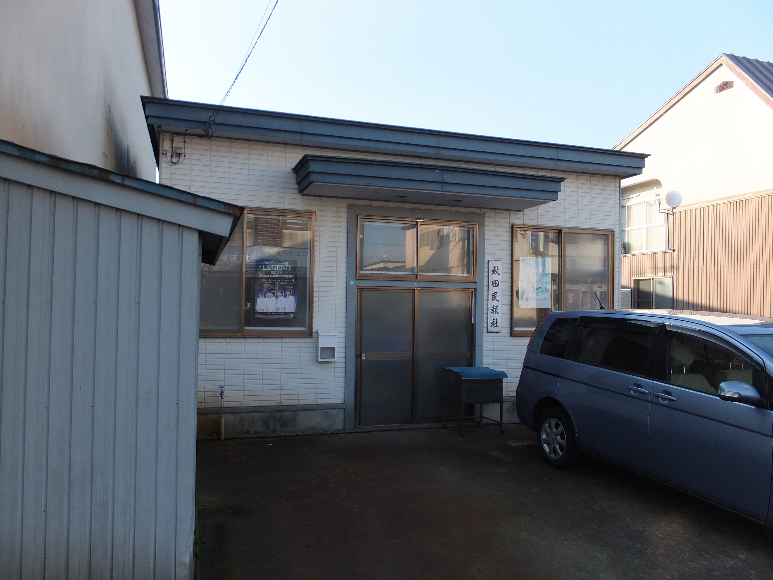 秋田民報社（秋田県大仙市）